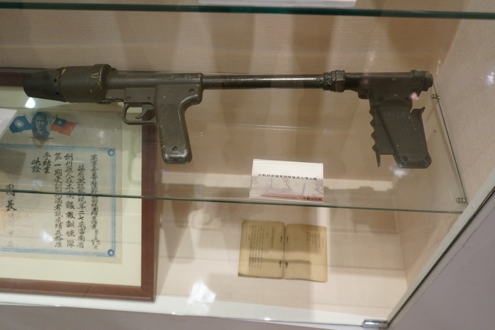 國民革命軍所用之噴火槍